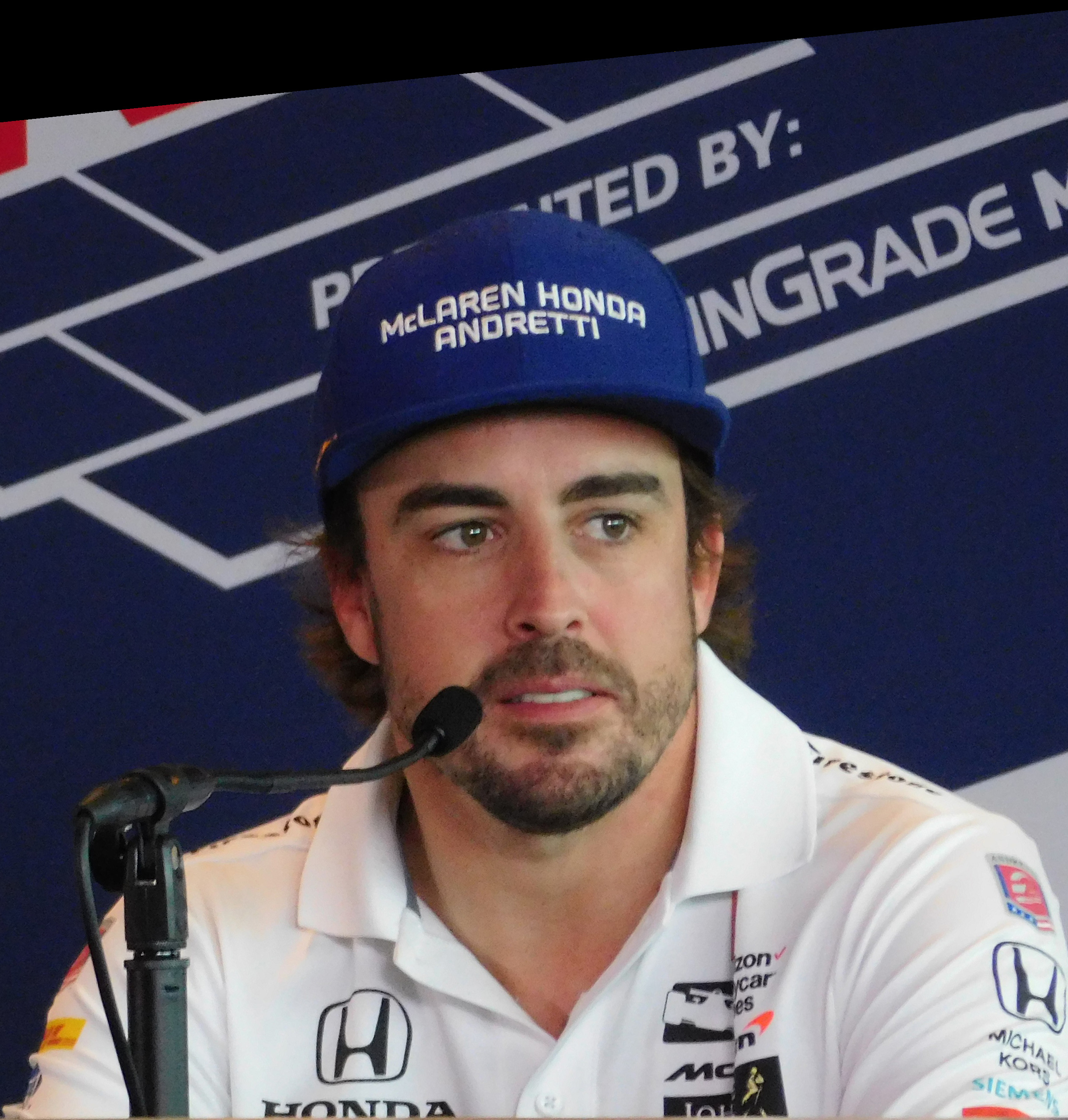 fernando alonso